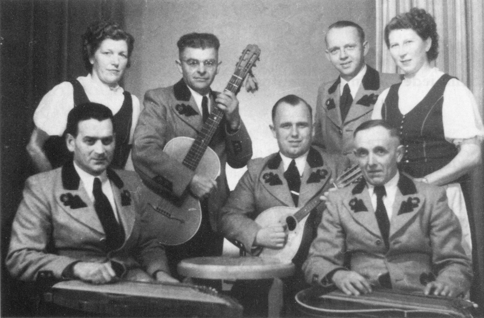 Fotografie der Ruppendorfer Ruinenspatzen von 1970